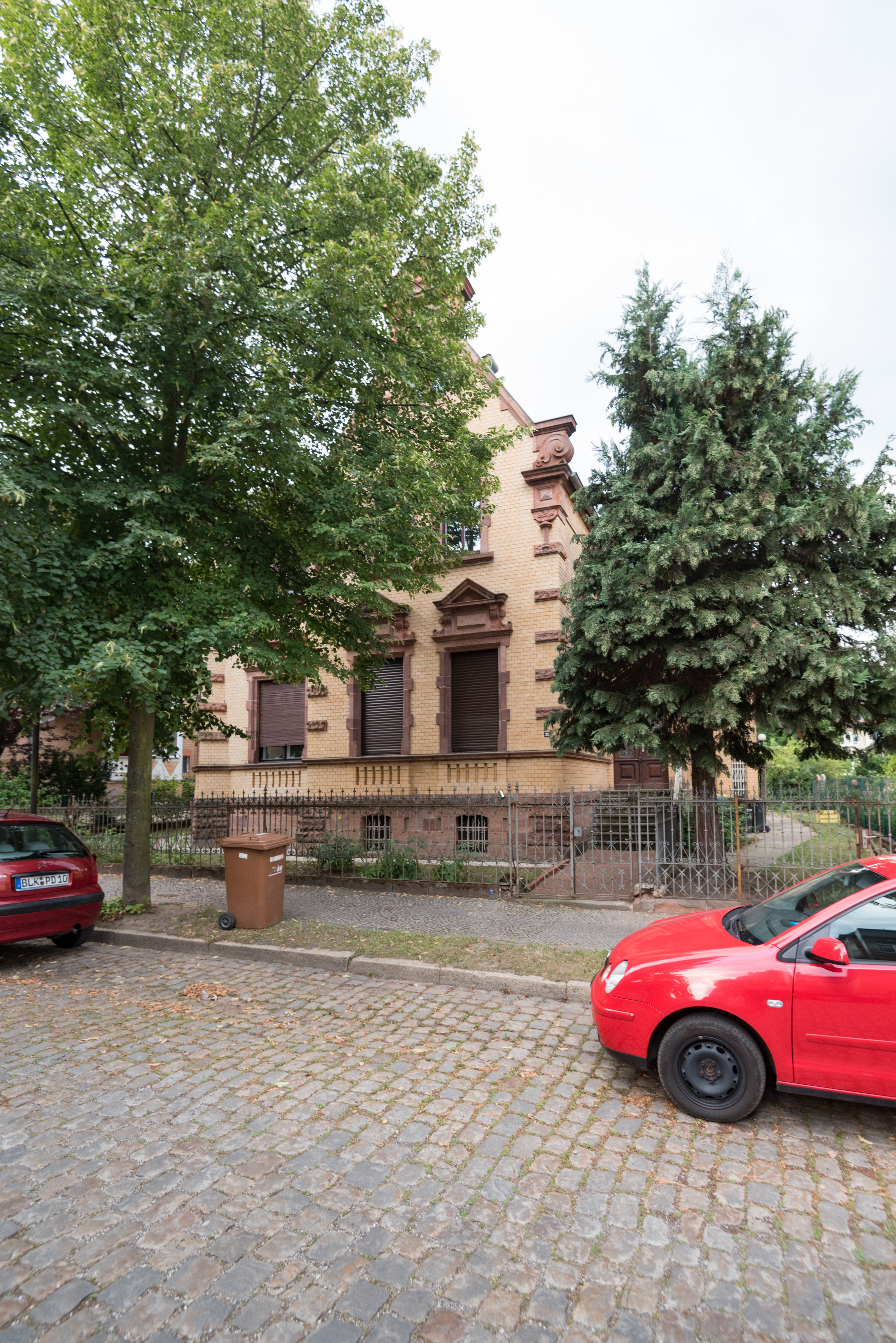 Naumburg (Saale), Buchholzstraße 39